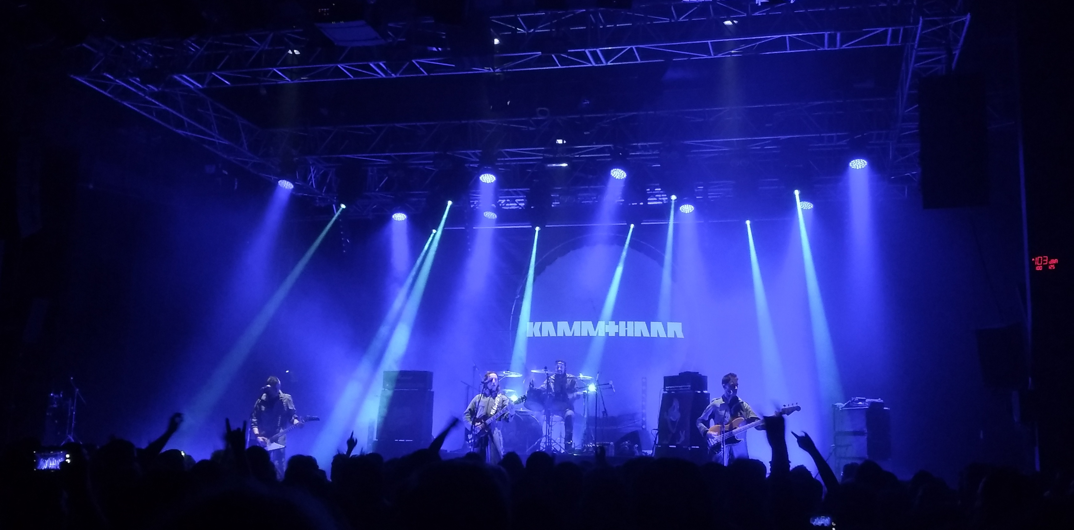 Le groupe Ultra Vomit interprétant la chanson "Kammthaar" au Fil à Saint-Étienne.